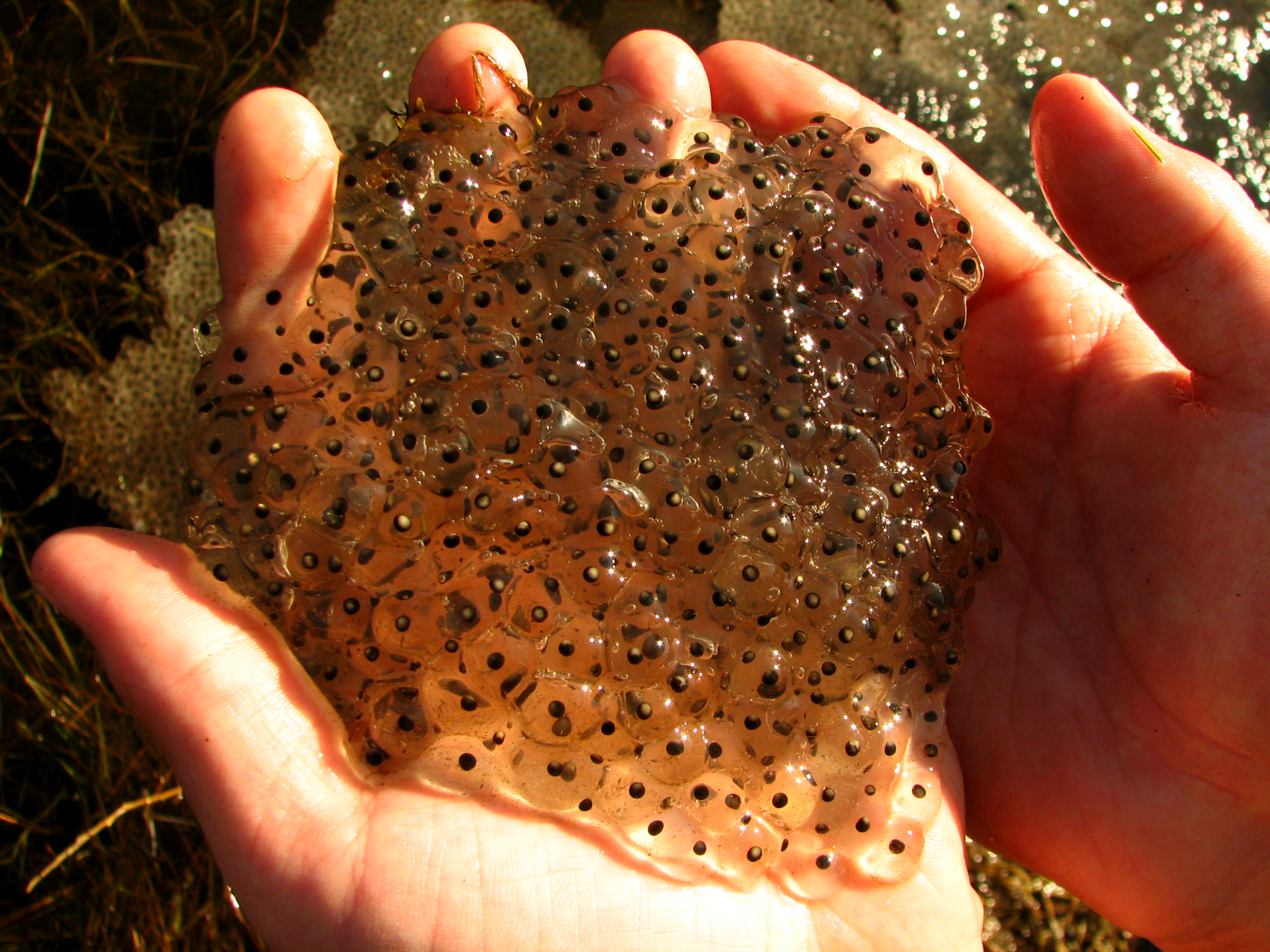 Konnakullesed